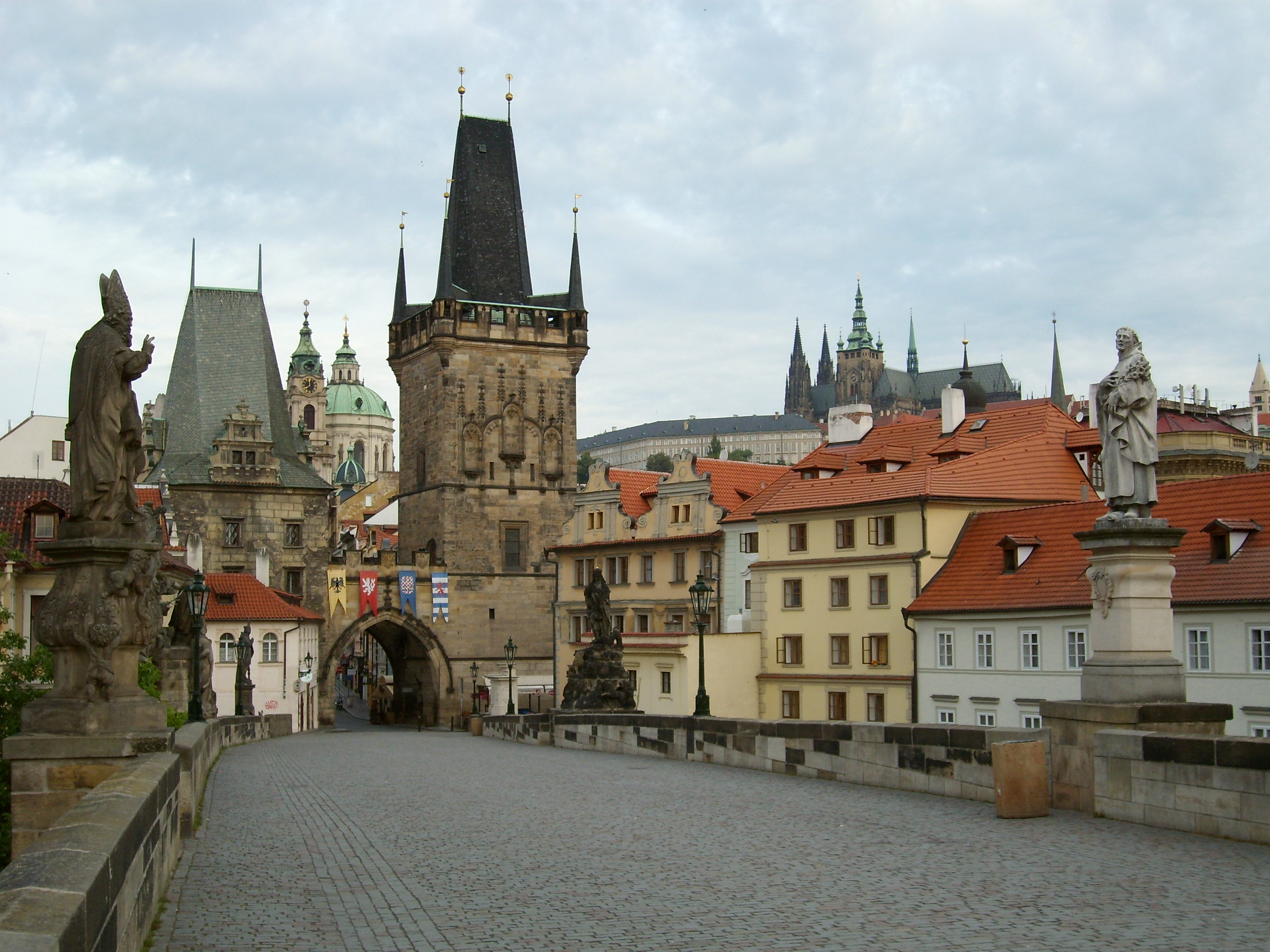 Blick von der Prager Karlsbrücke (Karlův most) nach Westen; im Hintergrund die Kleinseitner Brückentürme